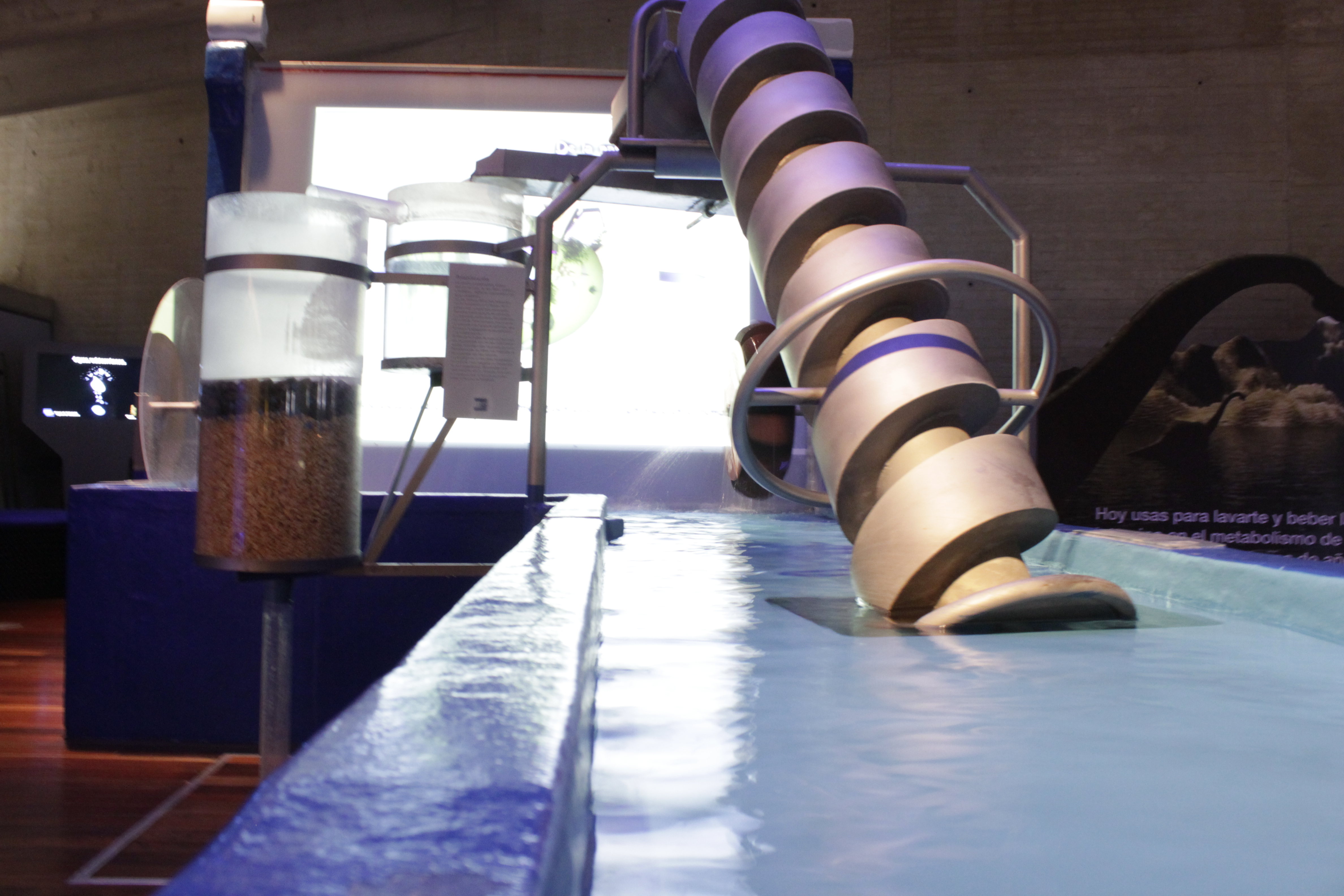 Sala del agua del Museo de la Ciencia de Valladolid